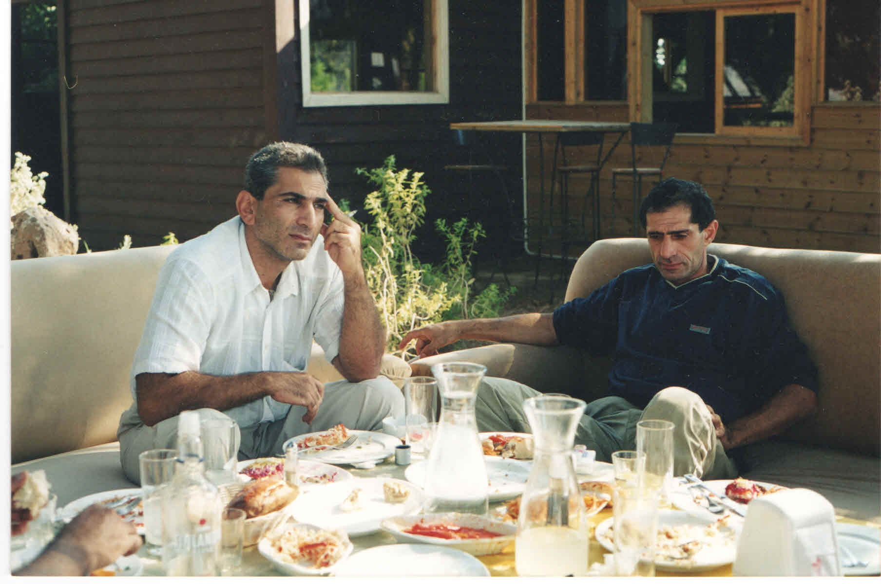 מועדון הקרב הקווקזי